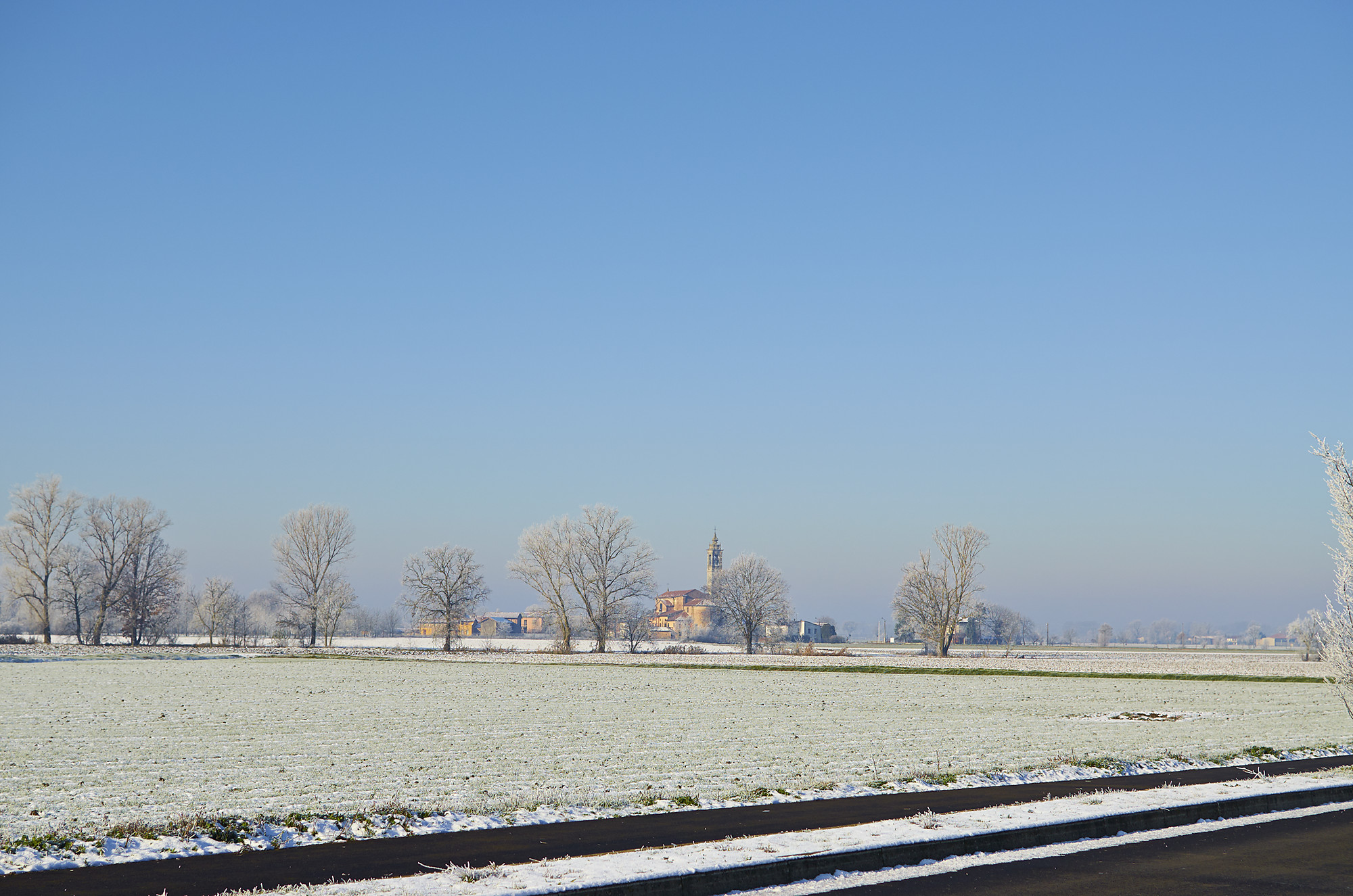 Vista verso Baselica